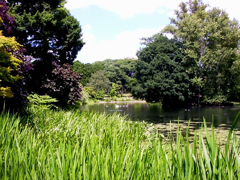 eigen foto van Kew Gardens, Engeland